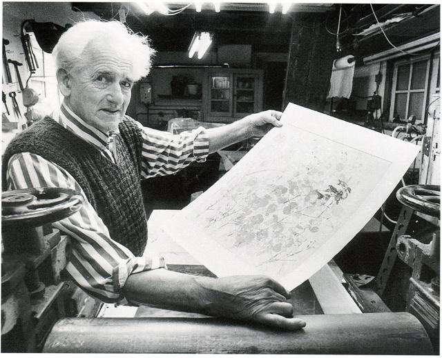 Abe Gerlsma met zijn ets "Judaspenning" in 1994.